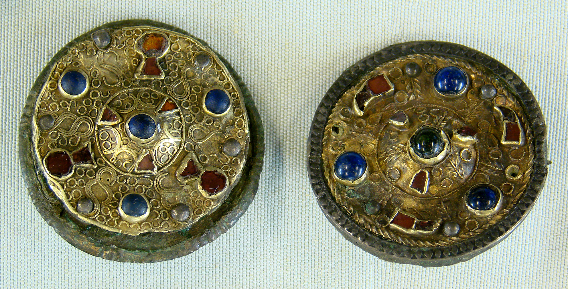 Fibules rondes, entre 570 et 690 + JC. Musée de Laon.